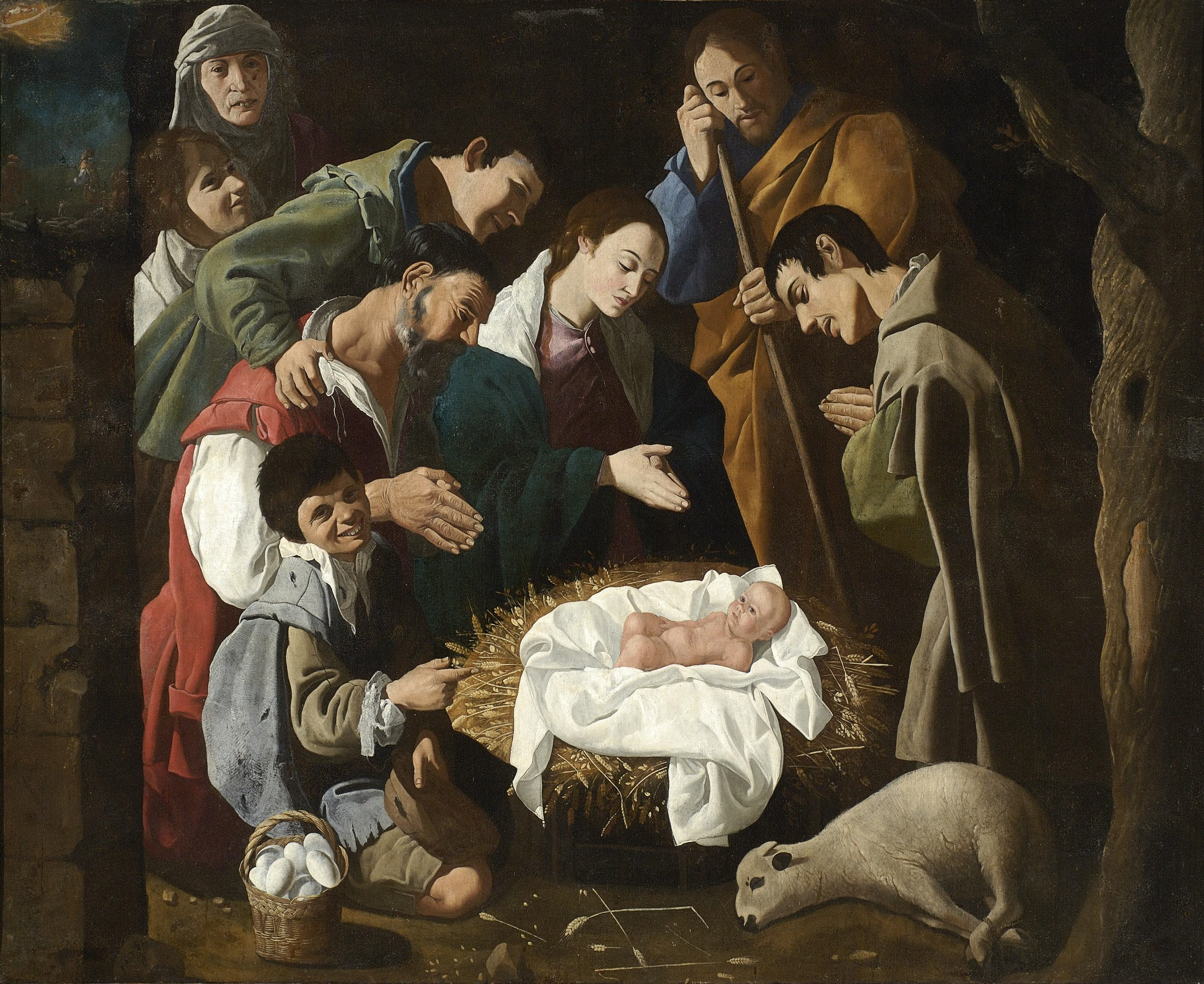 La obra representa el momento en que el Niño Jesús fue adorado por los pastores de Belén.